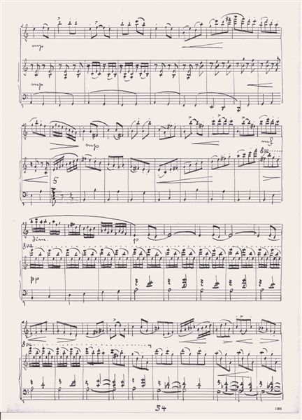 Alfred Huth - Musik für Flöte und Klavier (1951), S. 5